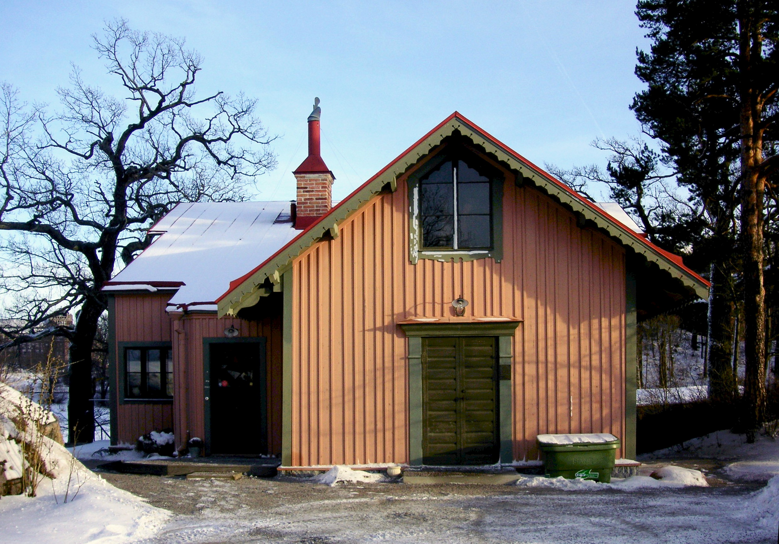 Bebyggelsen Gustavsborg vid Brunnsviken